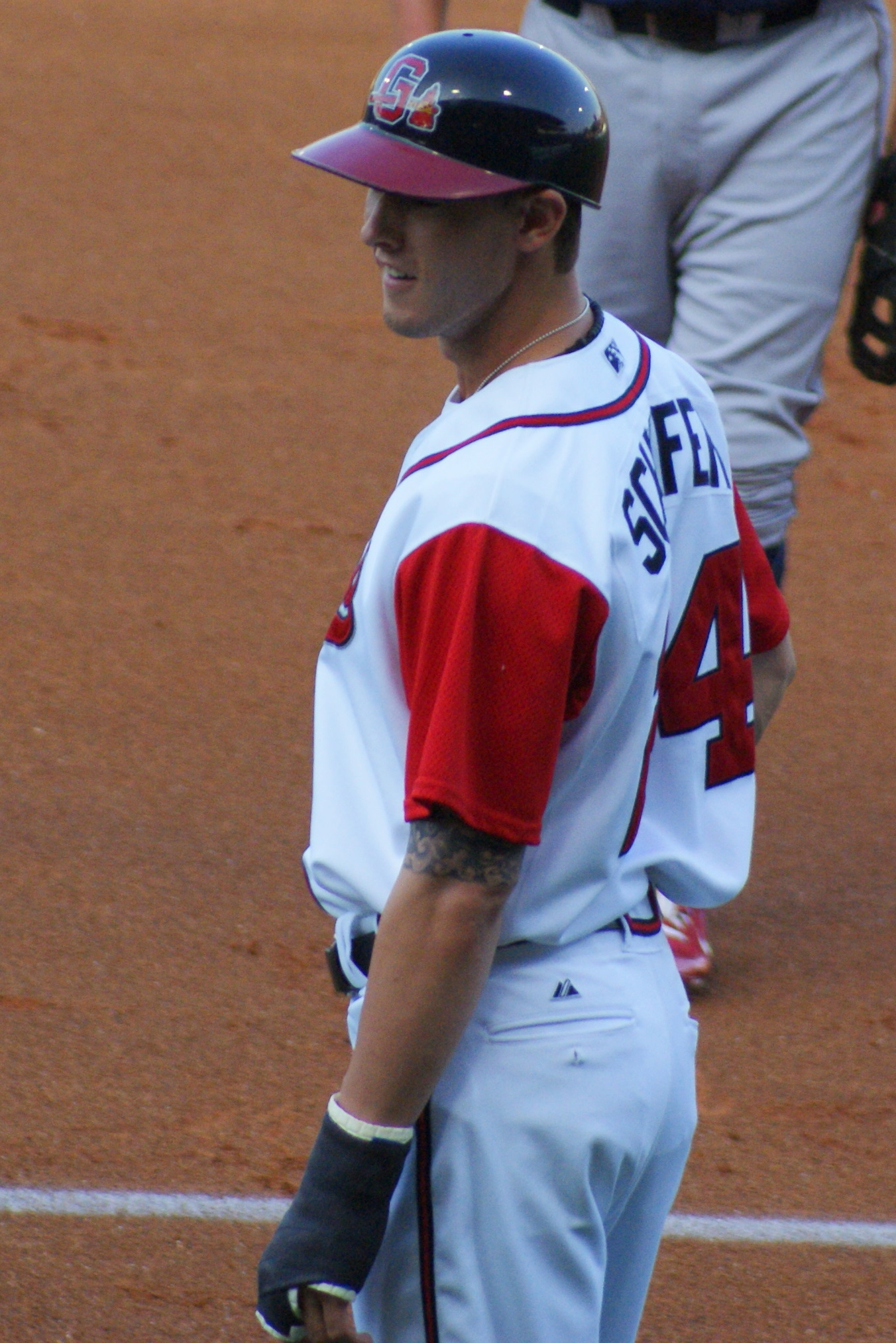 Jordan Schafer